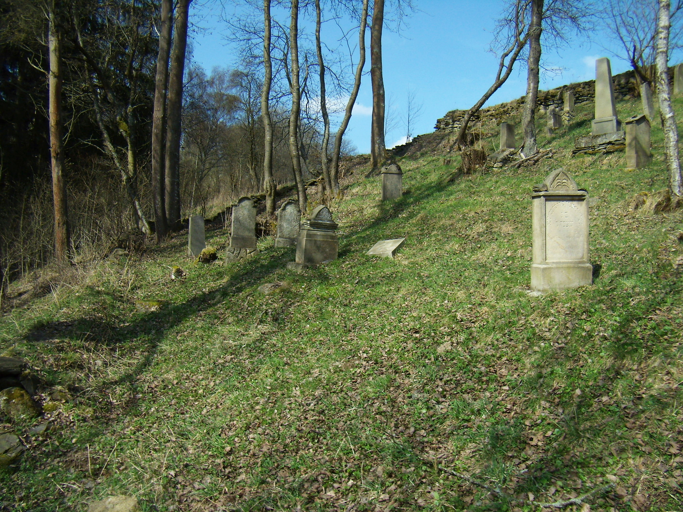 Kořen ŽH